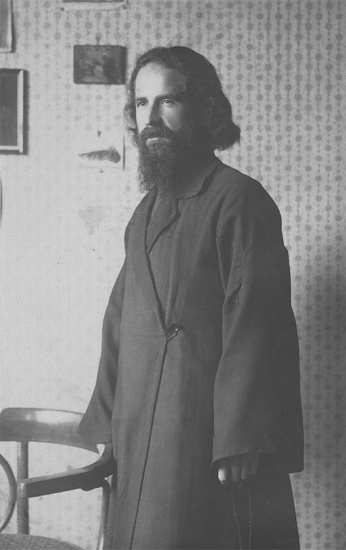 Проф. др Јустин Поповић